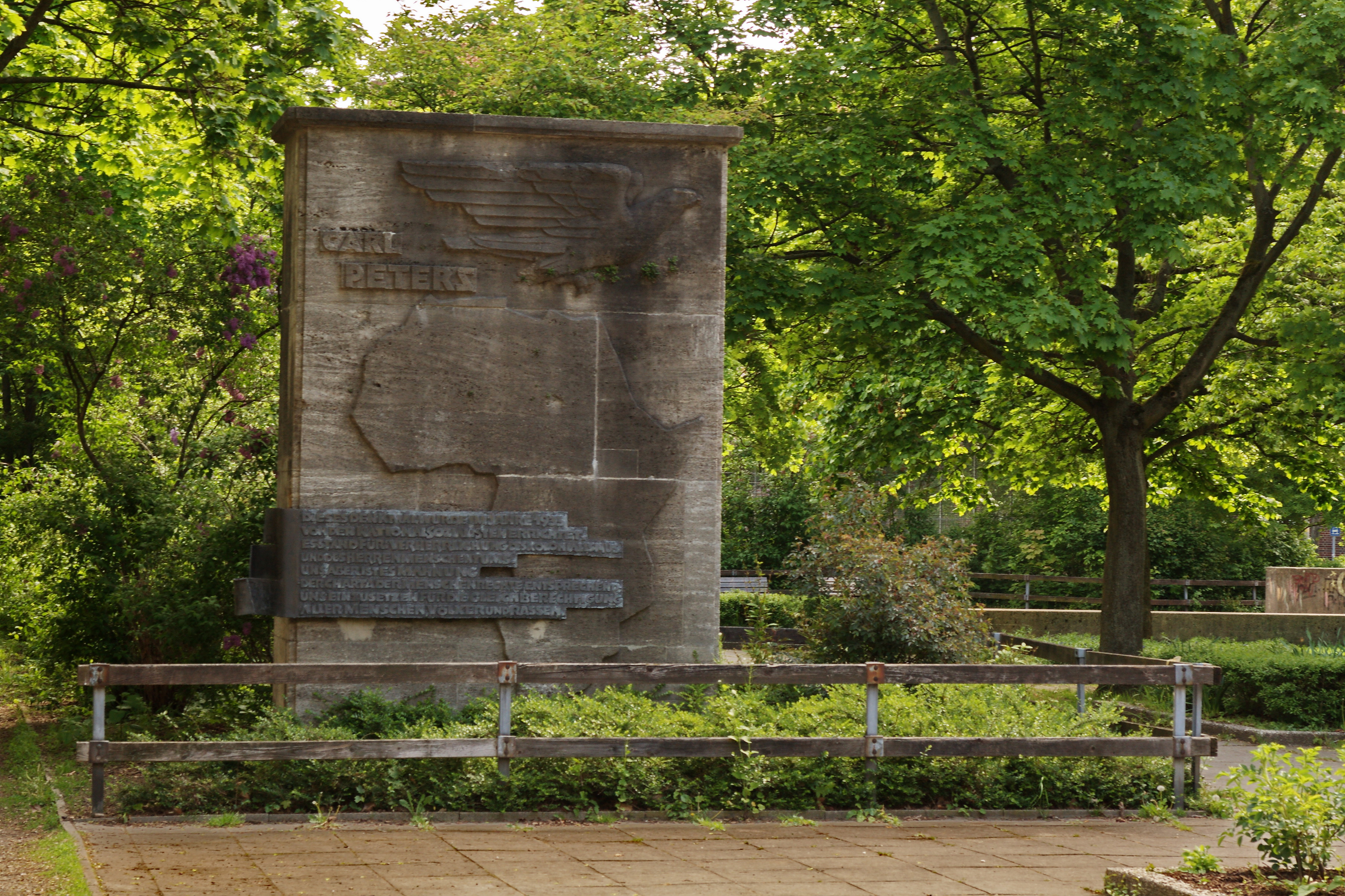 Karl-Peters-Denkmal am Bertha-von-Suttner-Platz in der Südstadt (Hannover), Niedersachsen, Deutschland